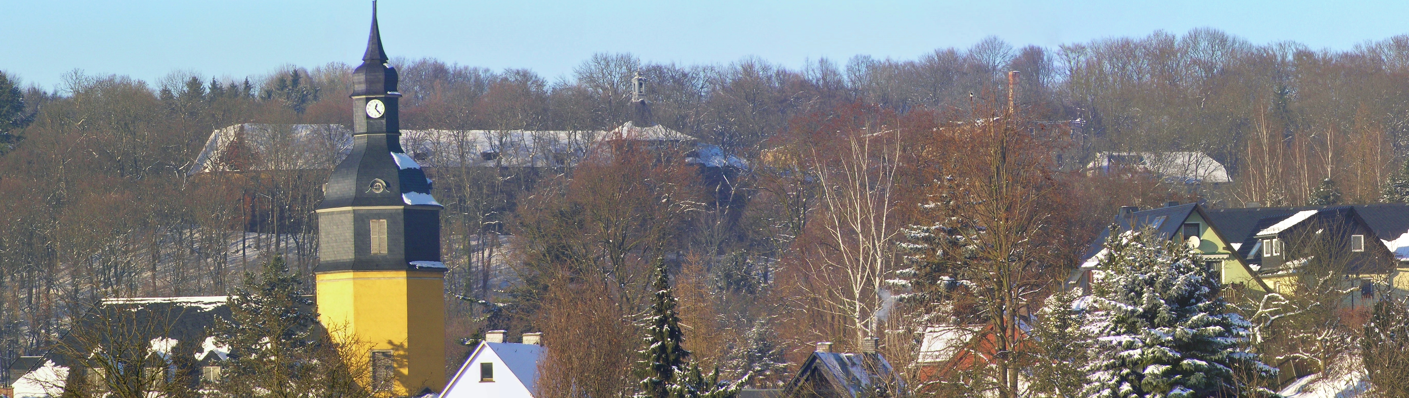 Das Schloss vor dem Teilrückbau